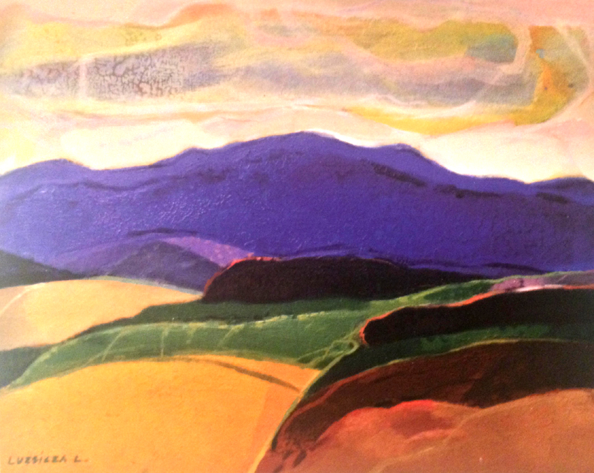 Luzsicza Lajos festőművész Börzsönyben című, magántulajdonban lévő festménye (1986, Plextol, farost, 50x60cm)